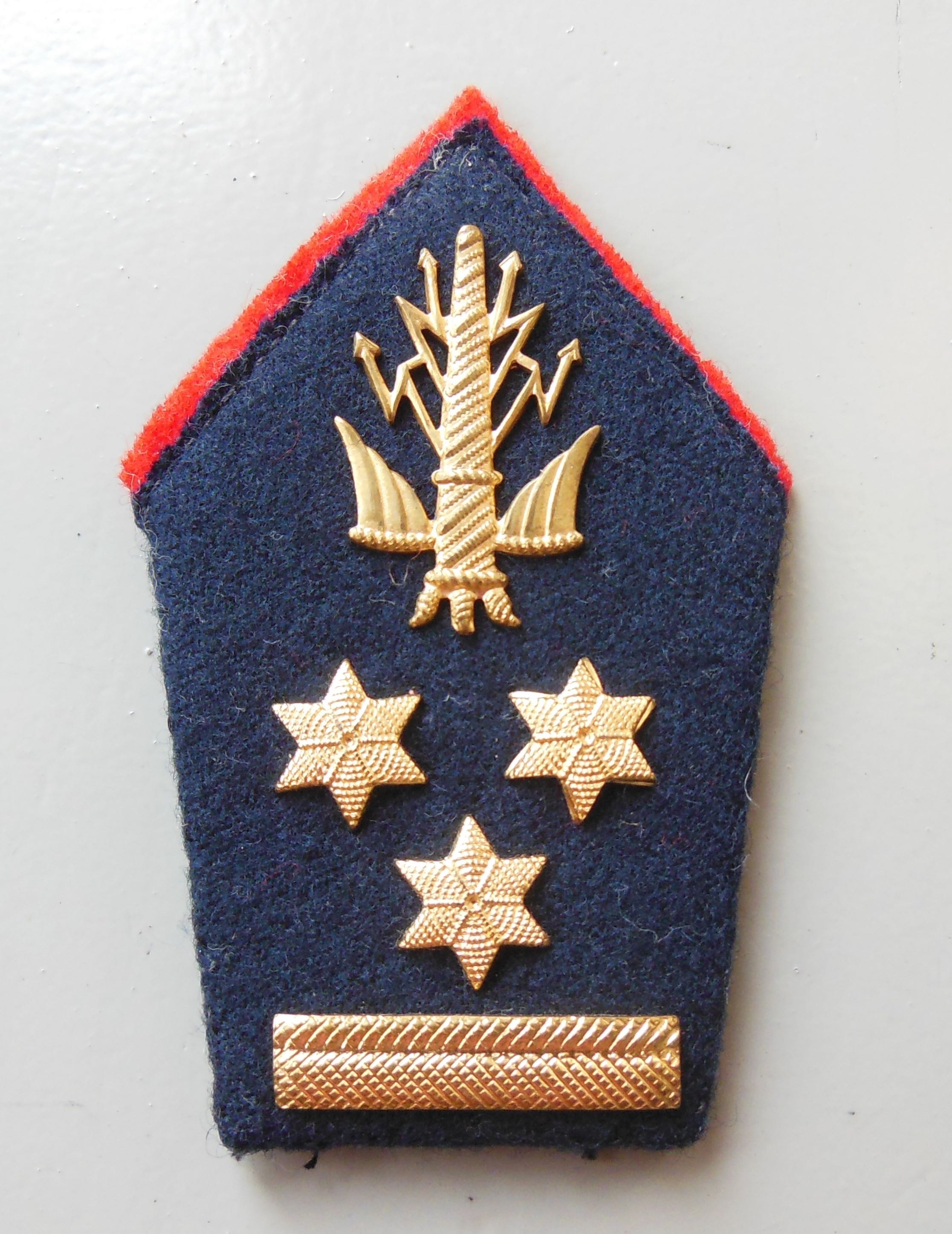 Afmetingen:3,5 bij 10 cm. De baret en sterren geven de rang aan. Het insigne bovenaan is het SBH insigne. De achtergrond is in de artilleriekleuren: blauw met rode bies